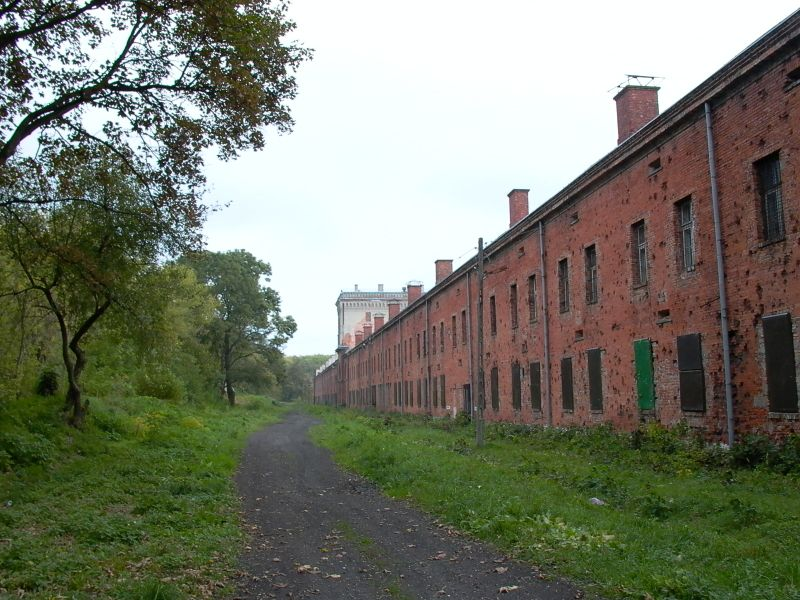 Fotografia przedstawia widok ogólny koszar obronnych Twierdzy Modlin. Zdjęcie wykonał Zbigniew Strucki.